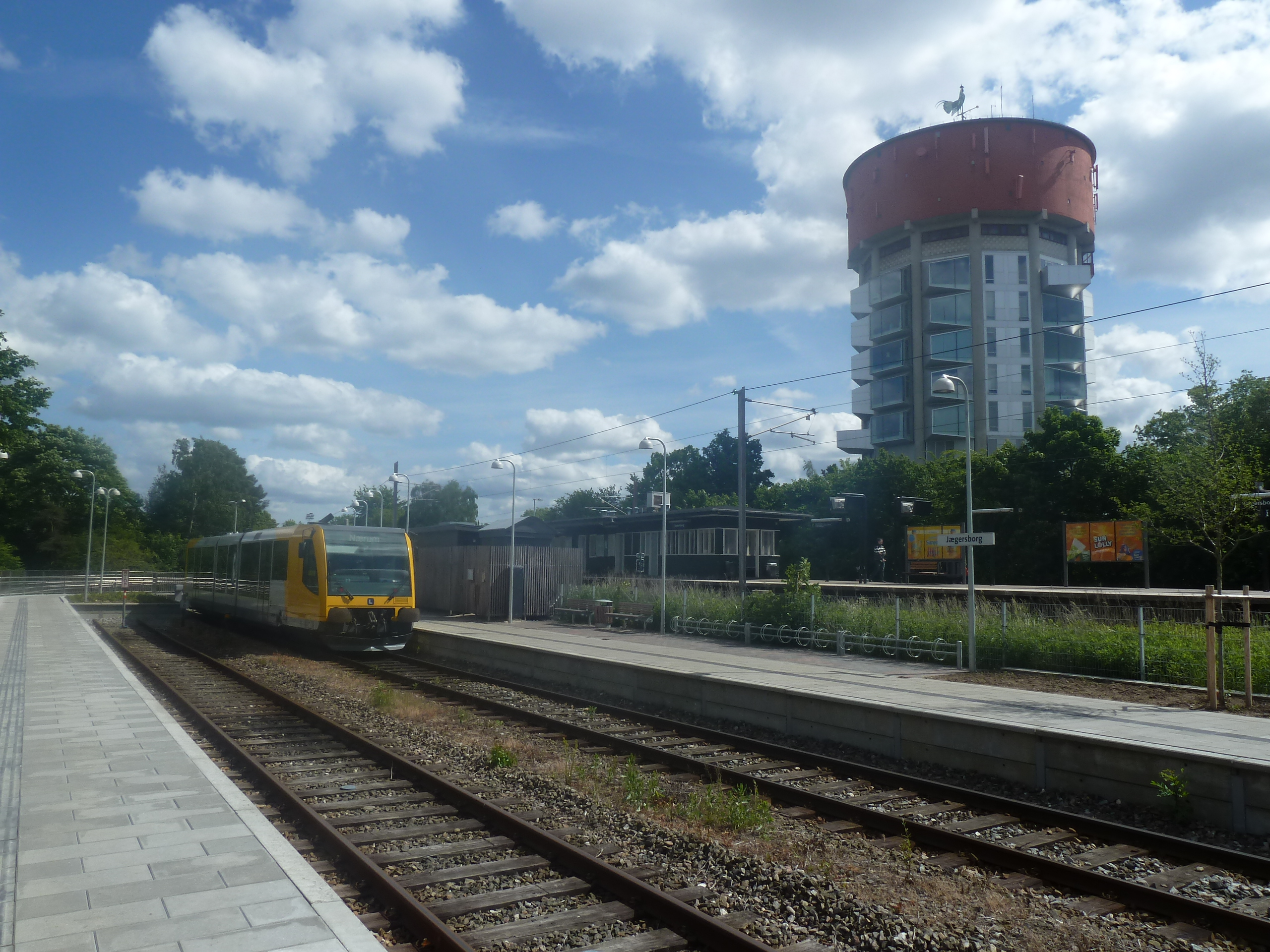 Jægersborg Station in Denmark.